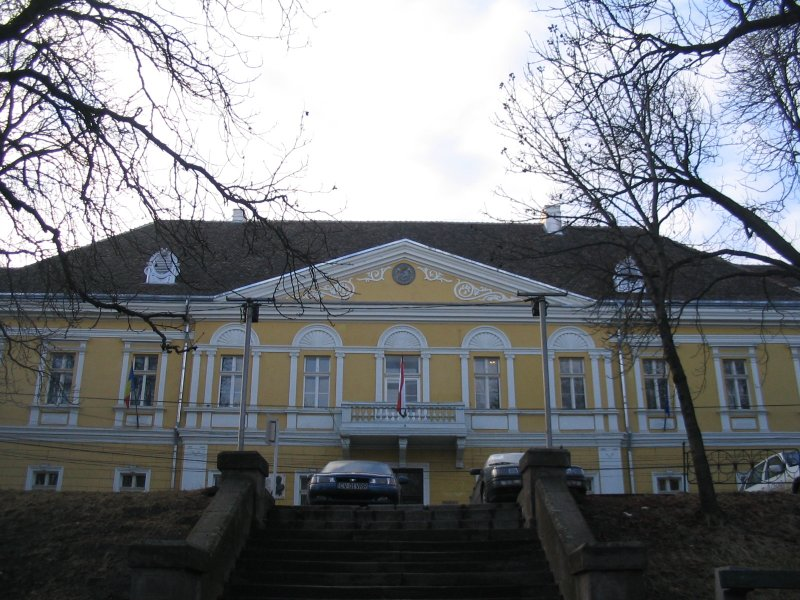 Fostul Sediu al Scaunelor, azi Biblioteca Județeană Covasna din Sfântu Gheorghe.